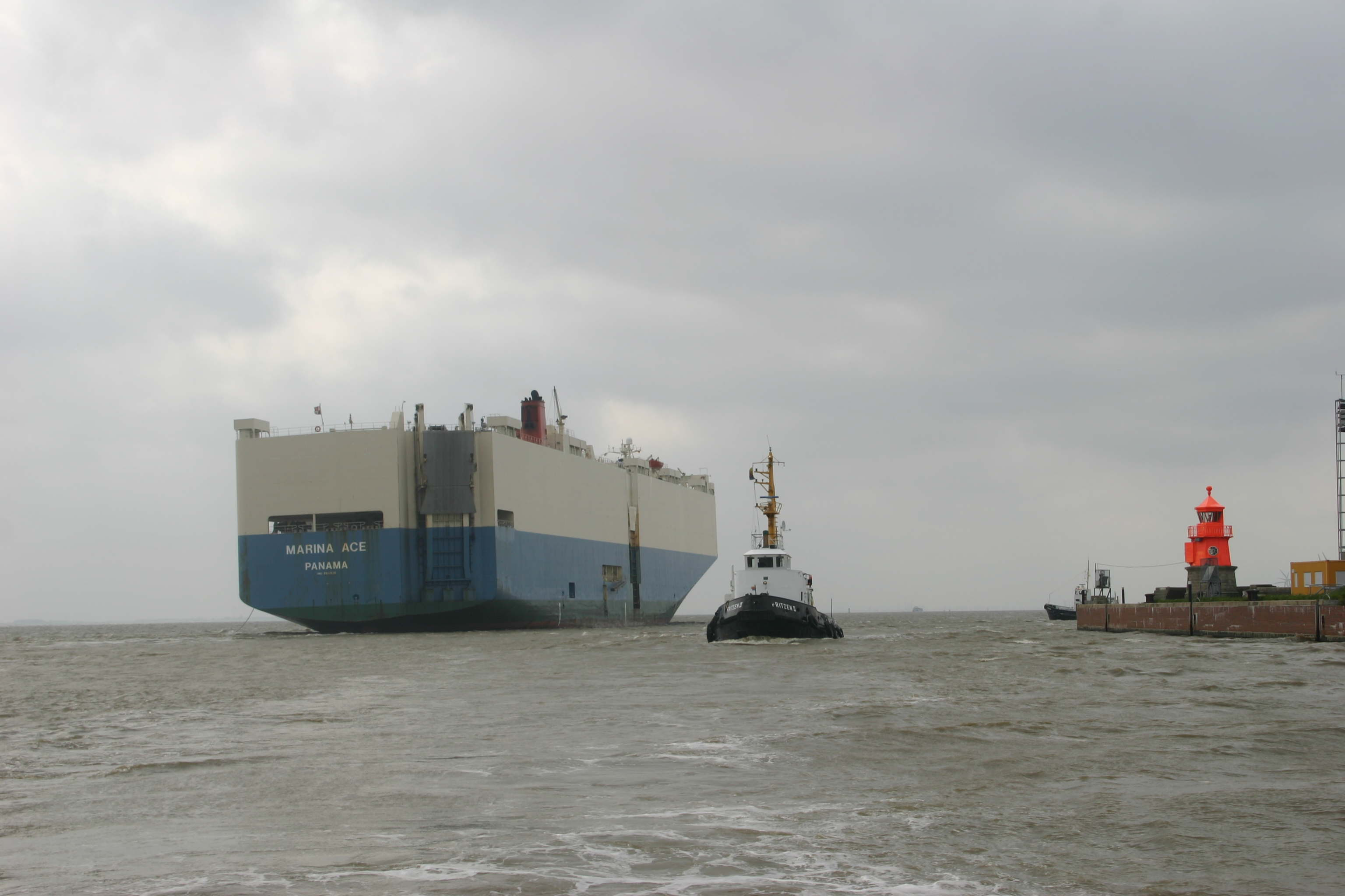 Ein Autotransporter verlässt den Emder Außenhafen, rechts die Westmole